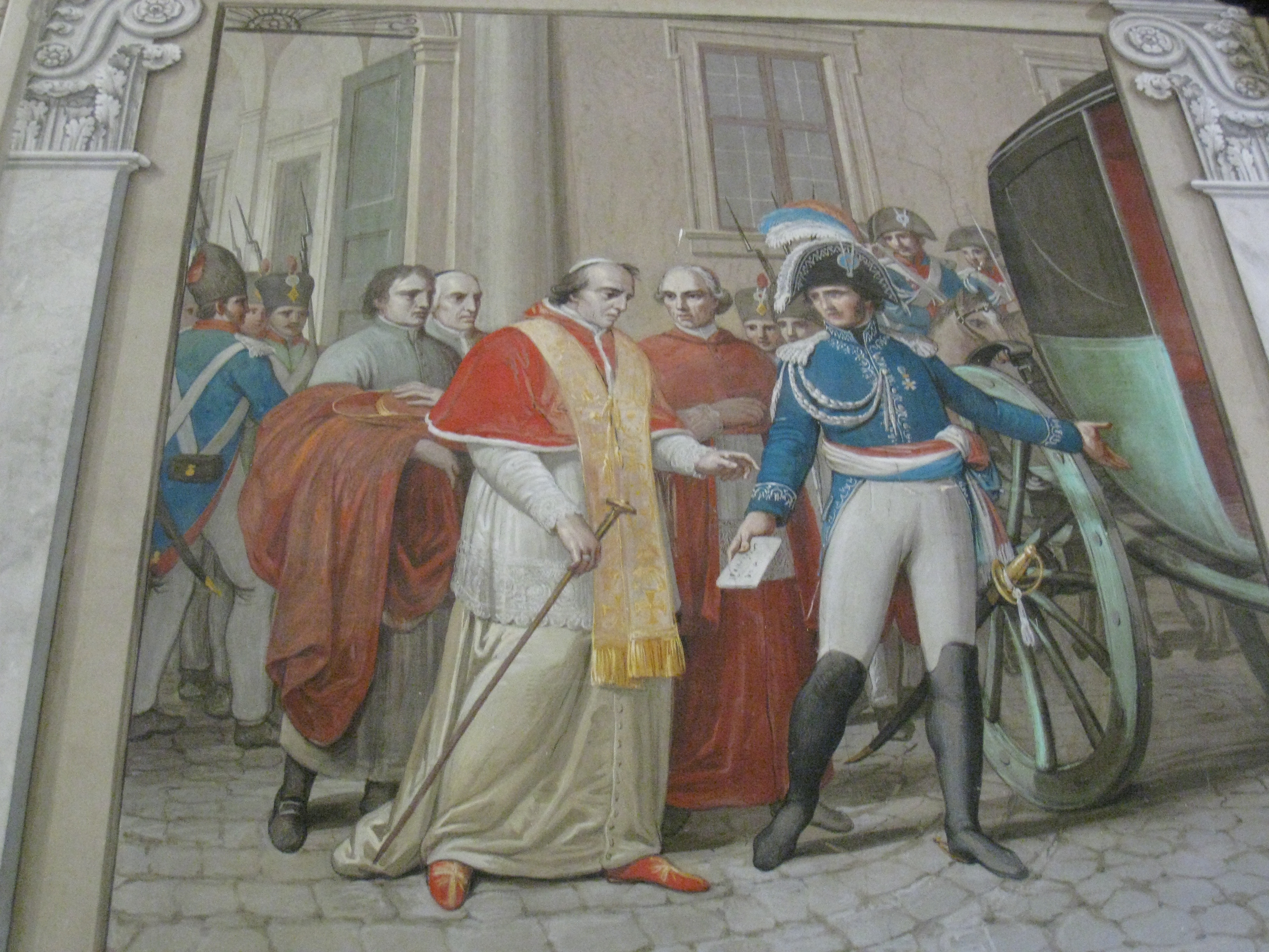 Musée Chiaramonti. Arrestation du Pape Pie VII par le Général Radet dans la nuit du 5 au 6 juillet 1809